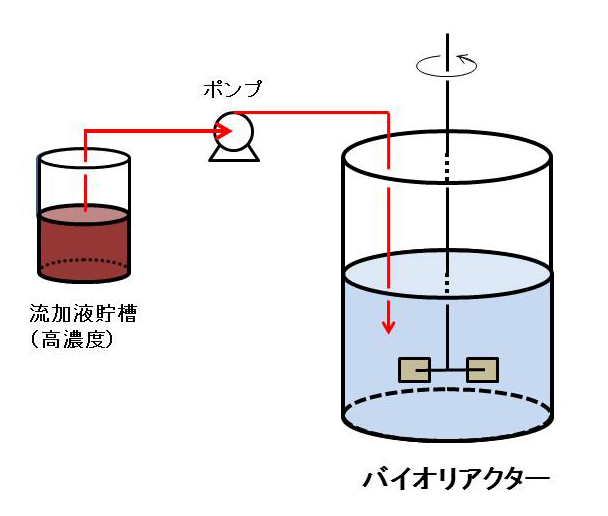 項目「流加培養」の図１